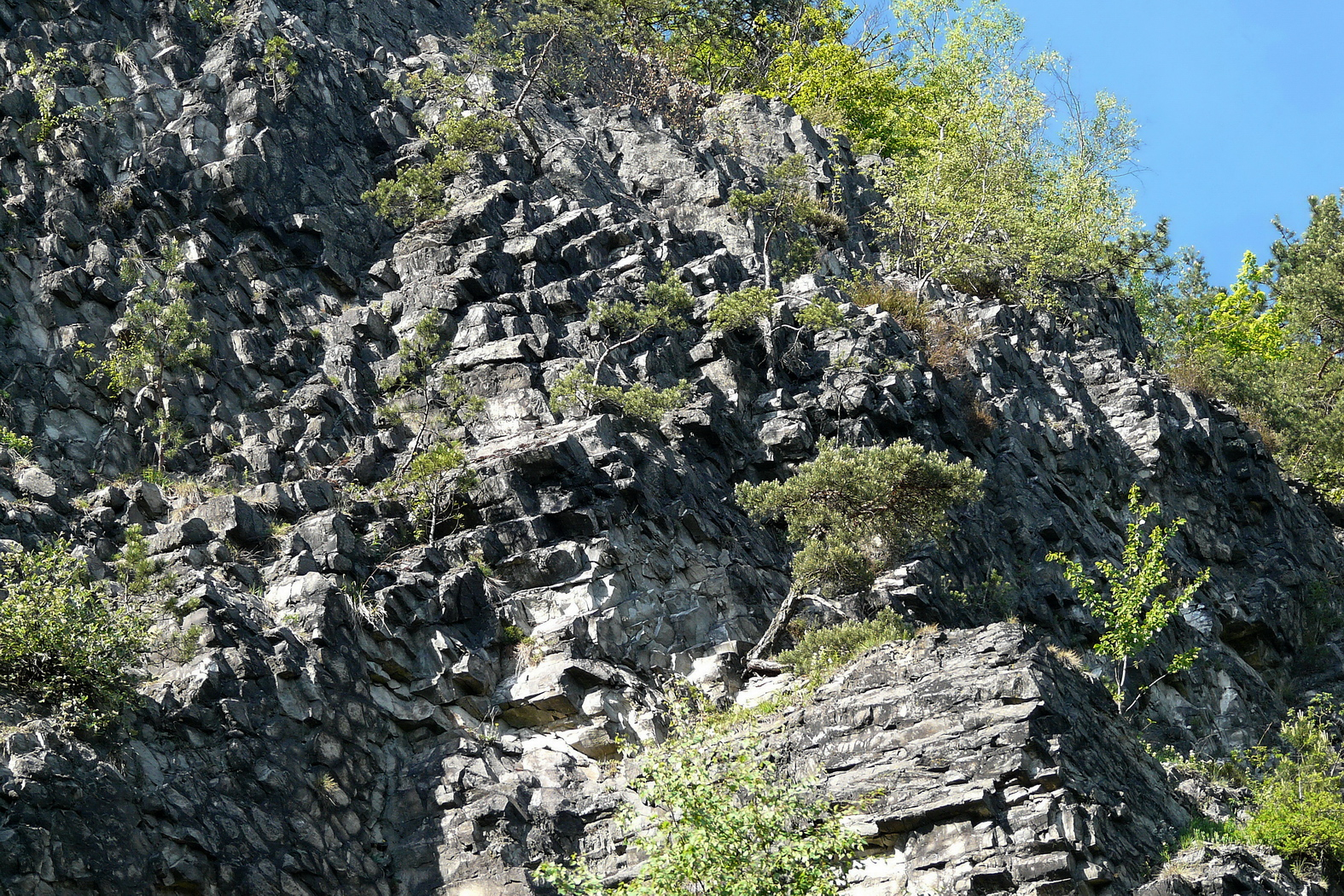 Bývalý znělcový lom Malý Bezděz